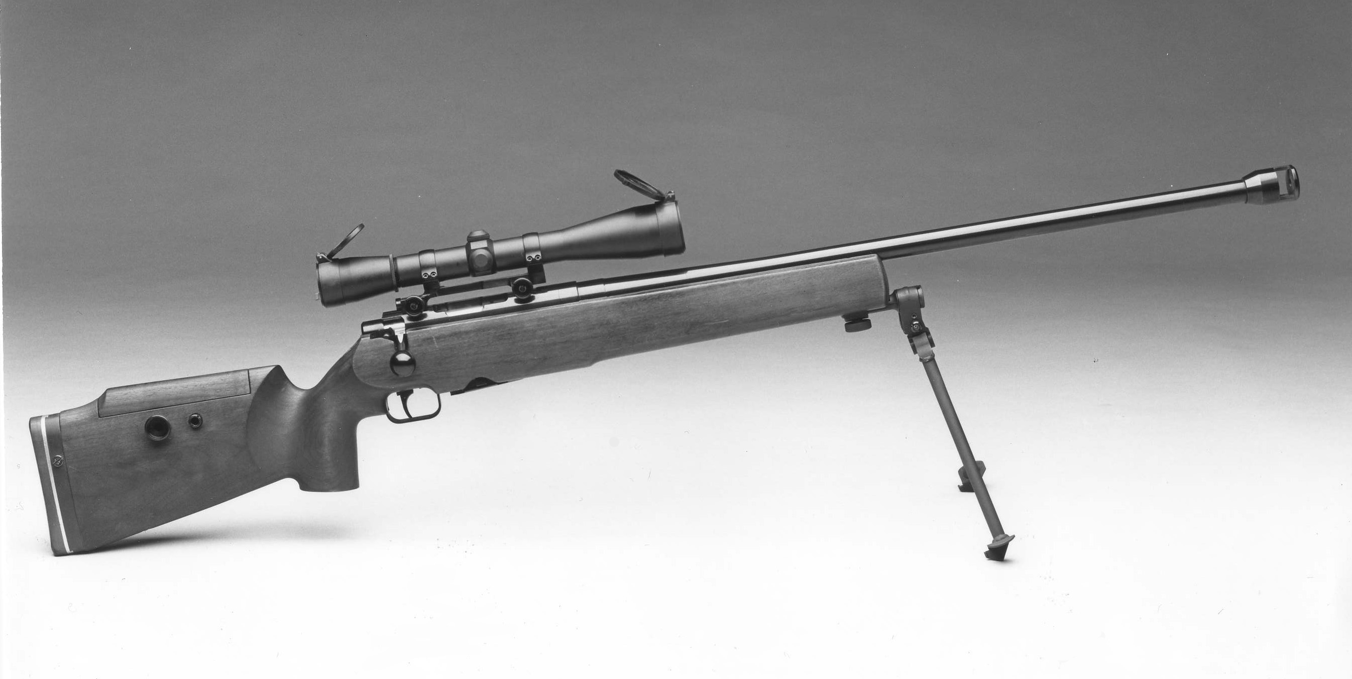 Description